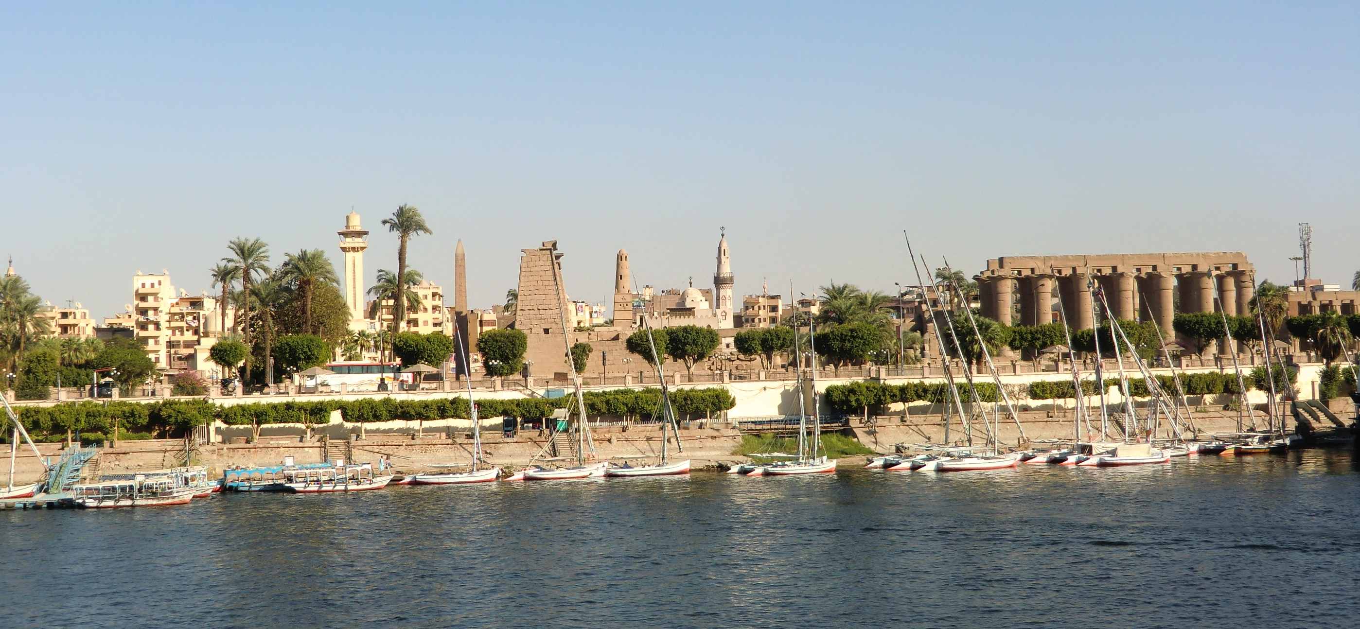 Louxor vu du Nil.